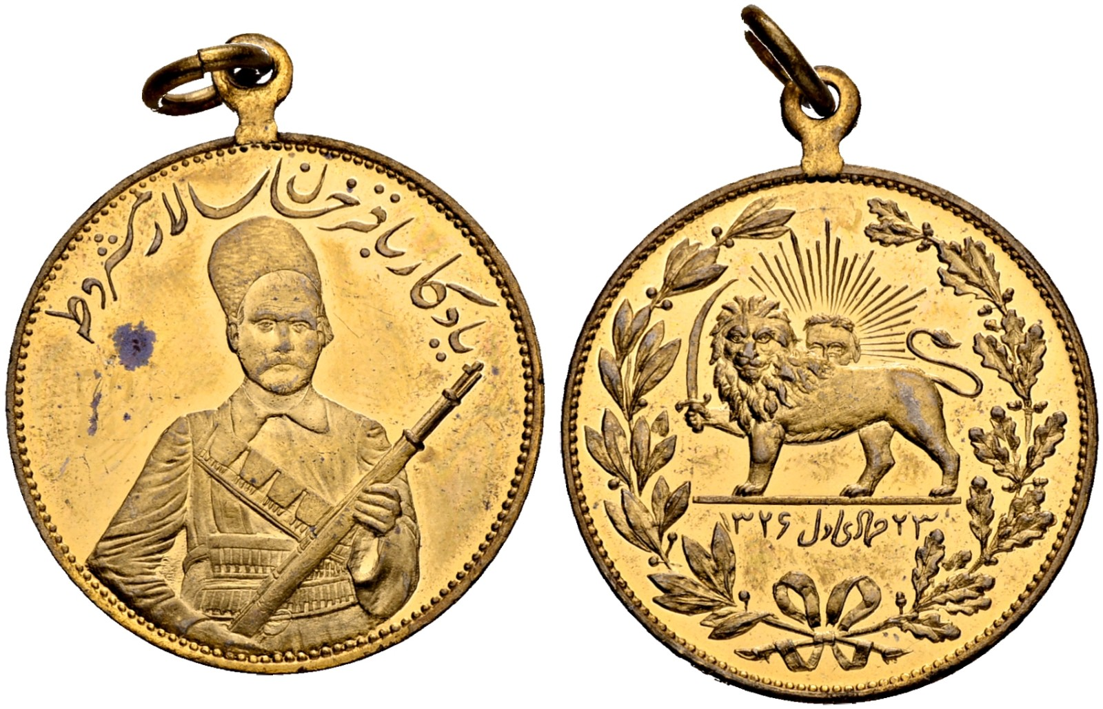 نشان برنزی باقرخان سالار مشروطه بوزن 8/32 گرم